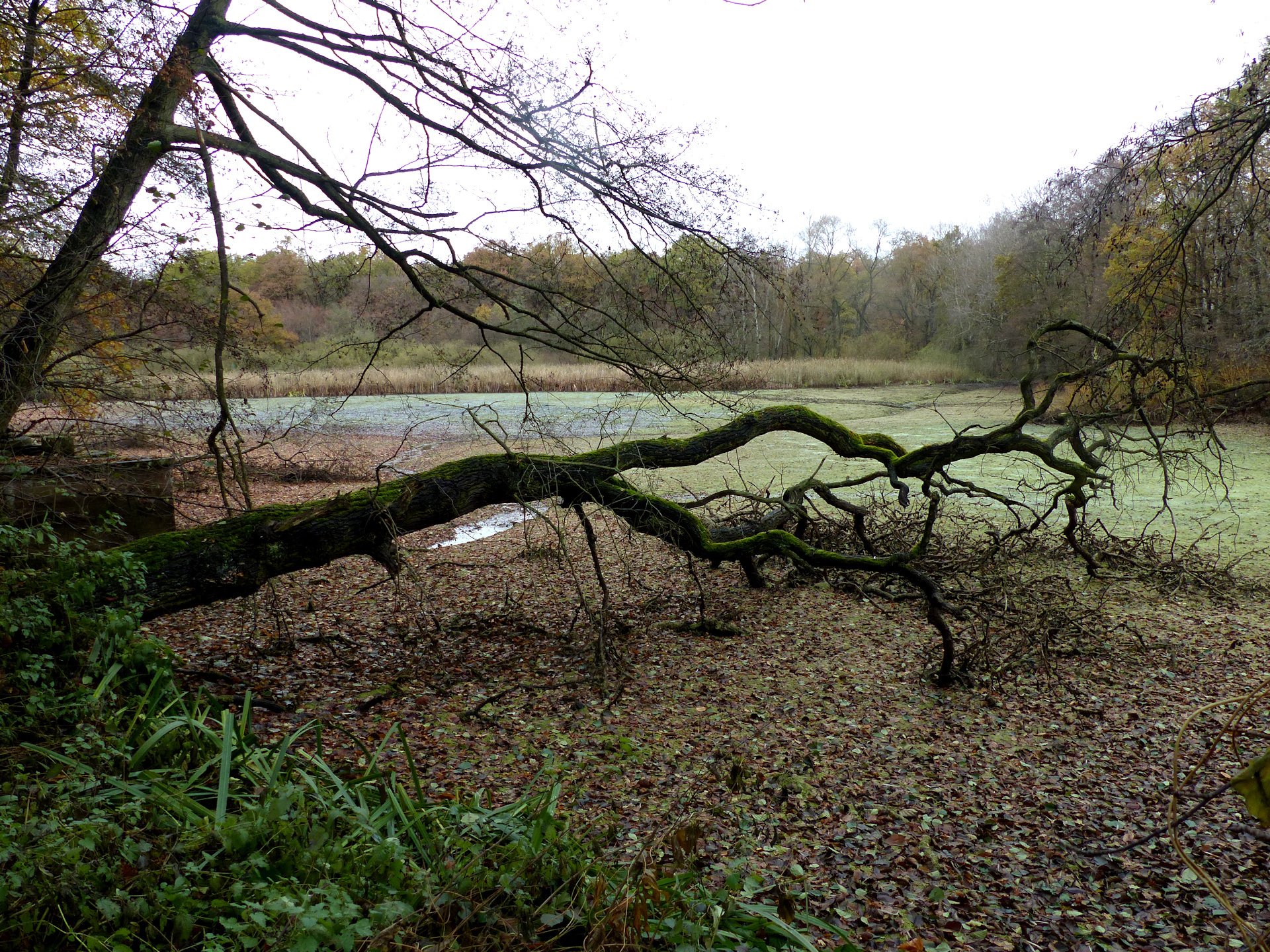 Der abgelassene Kauleteich, links das Ablaufbauwerk ("Mönch"), im hinteren Bildbereich der Durchfluss des Möncheteichgrabens.